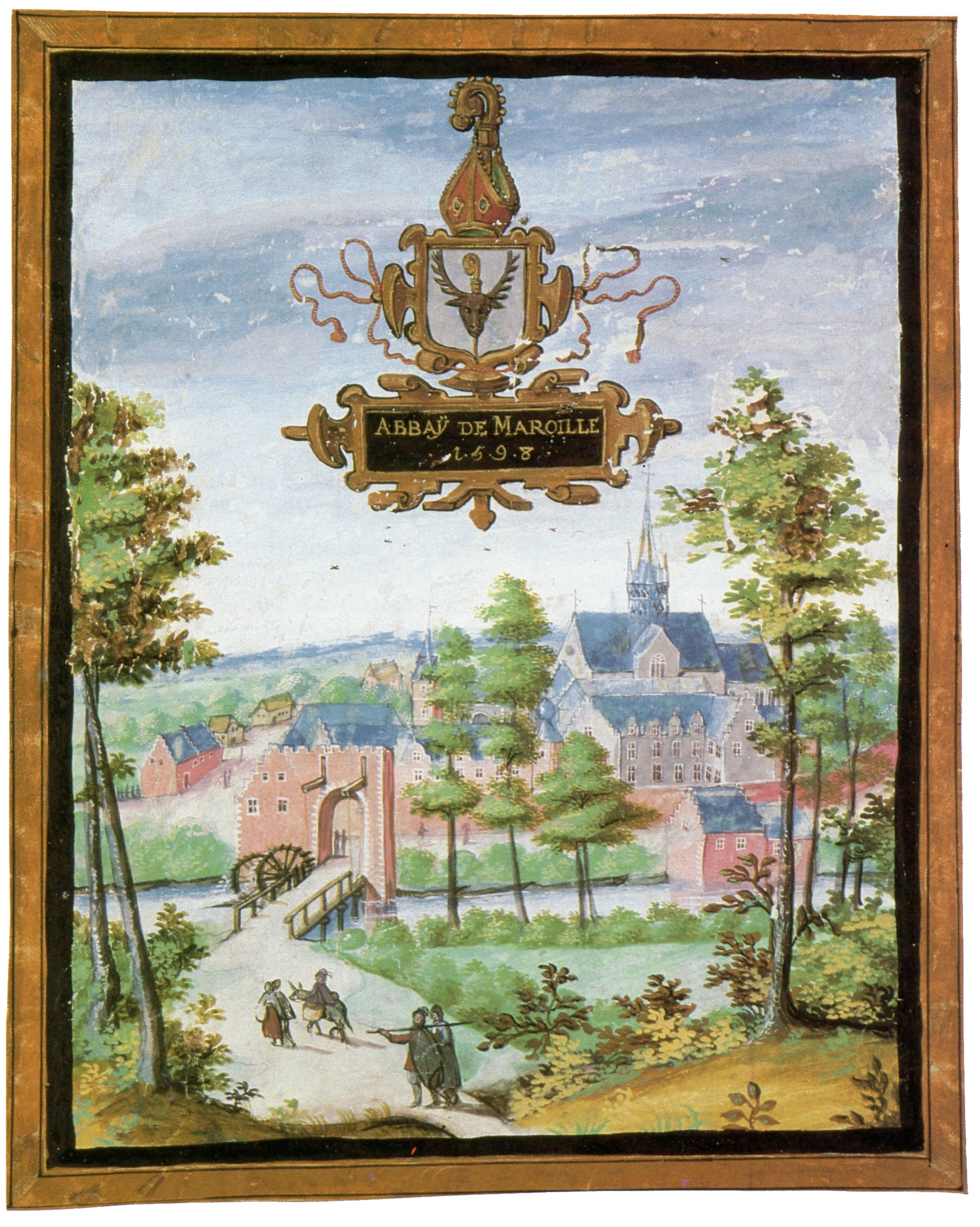 Abbaye de Maroilles en 1598. Albums de Croÿ, Vienne, Österreichische Nationalbiblithek.